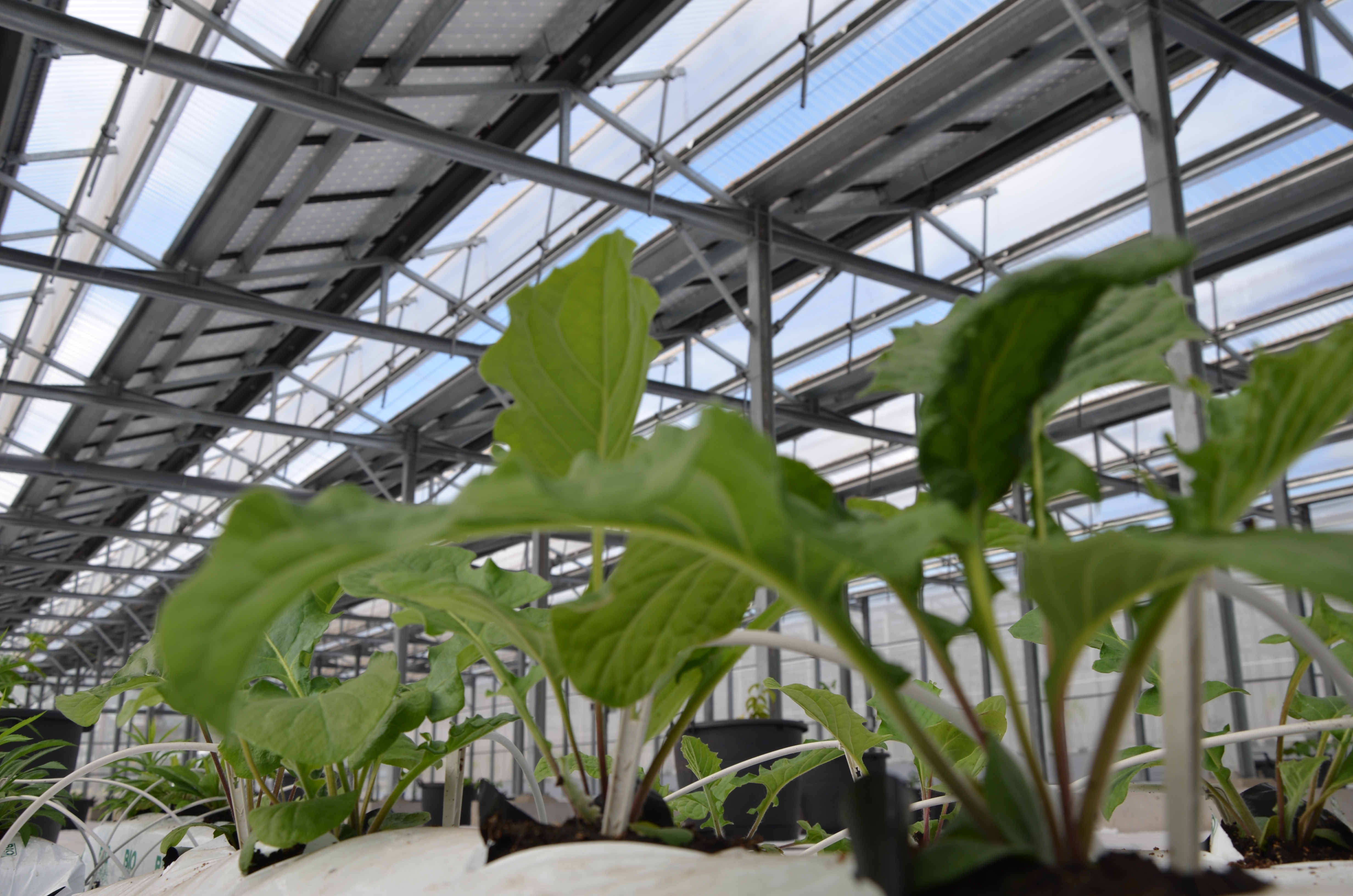 Plantations sous une serre photovoltaïque Agrinergie® de Akuo Energy